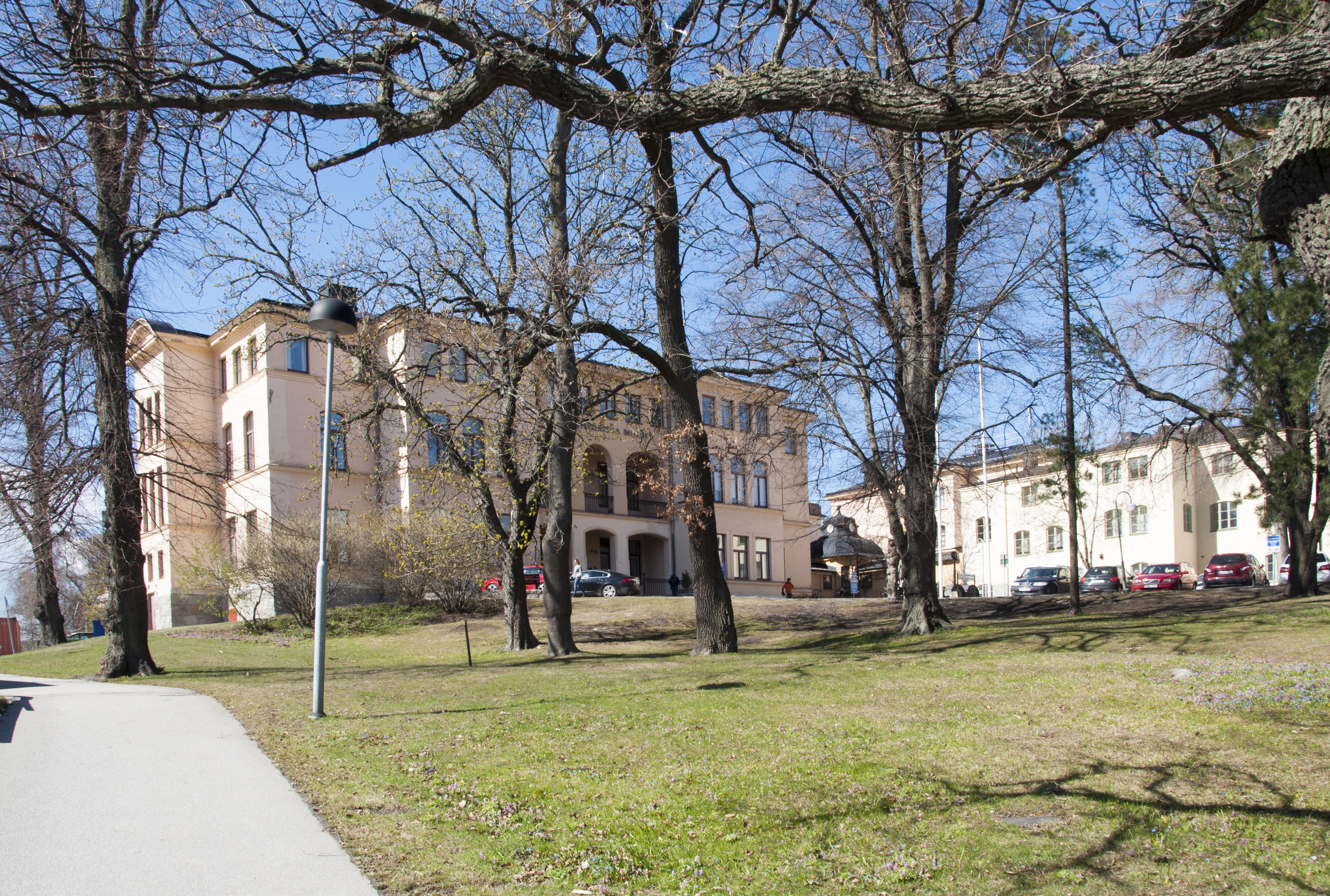 Karolinska Solna, Eugeniahemmet - Stora hemmet. Byggnadsår 1896. Arkitekt Gustaf Lindgren